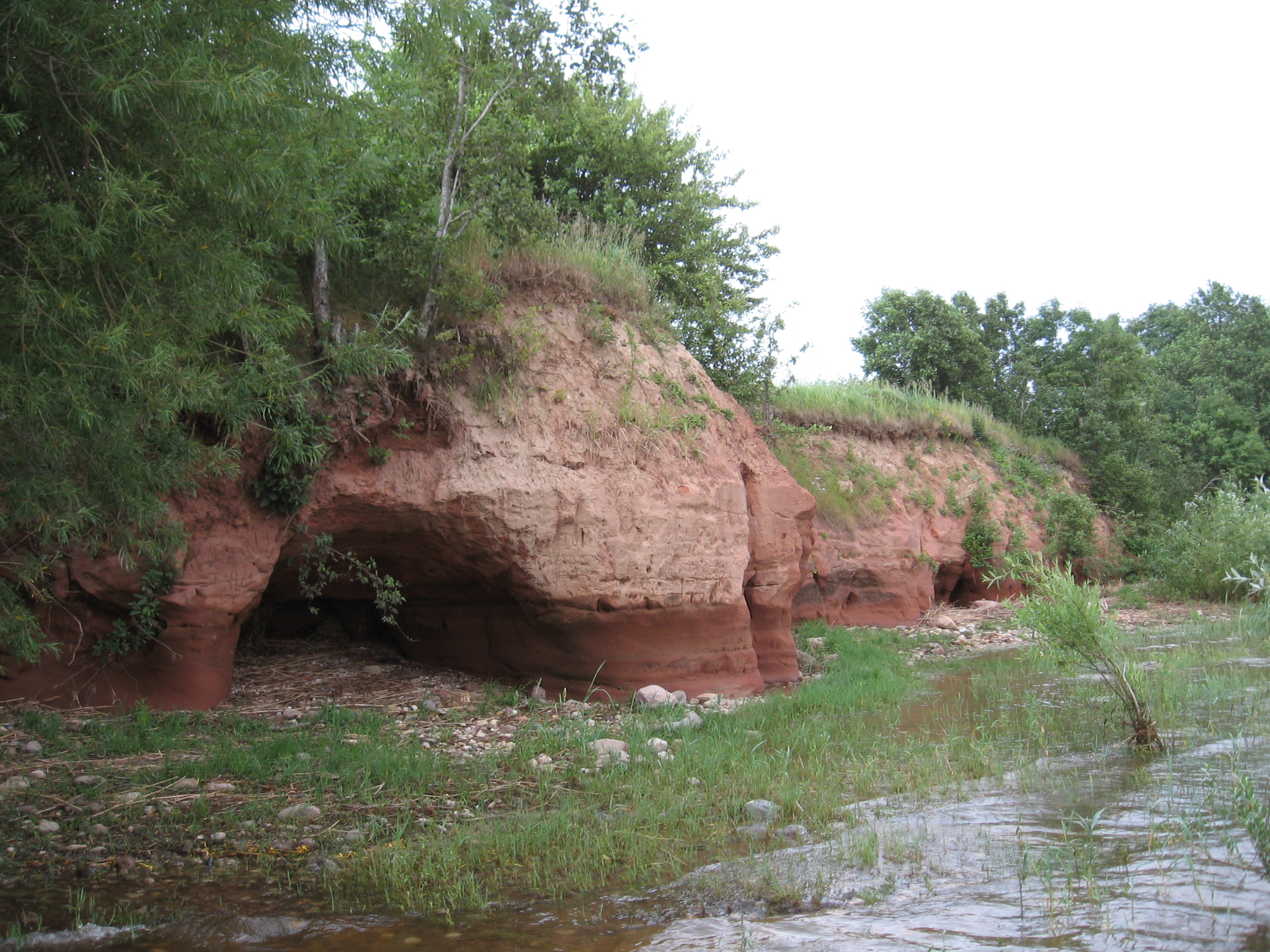 Tamme paljand